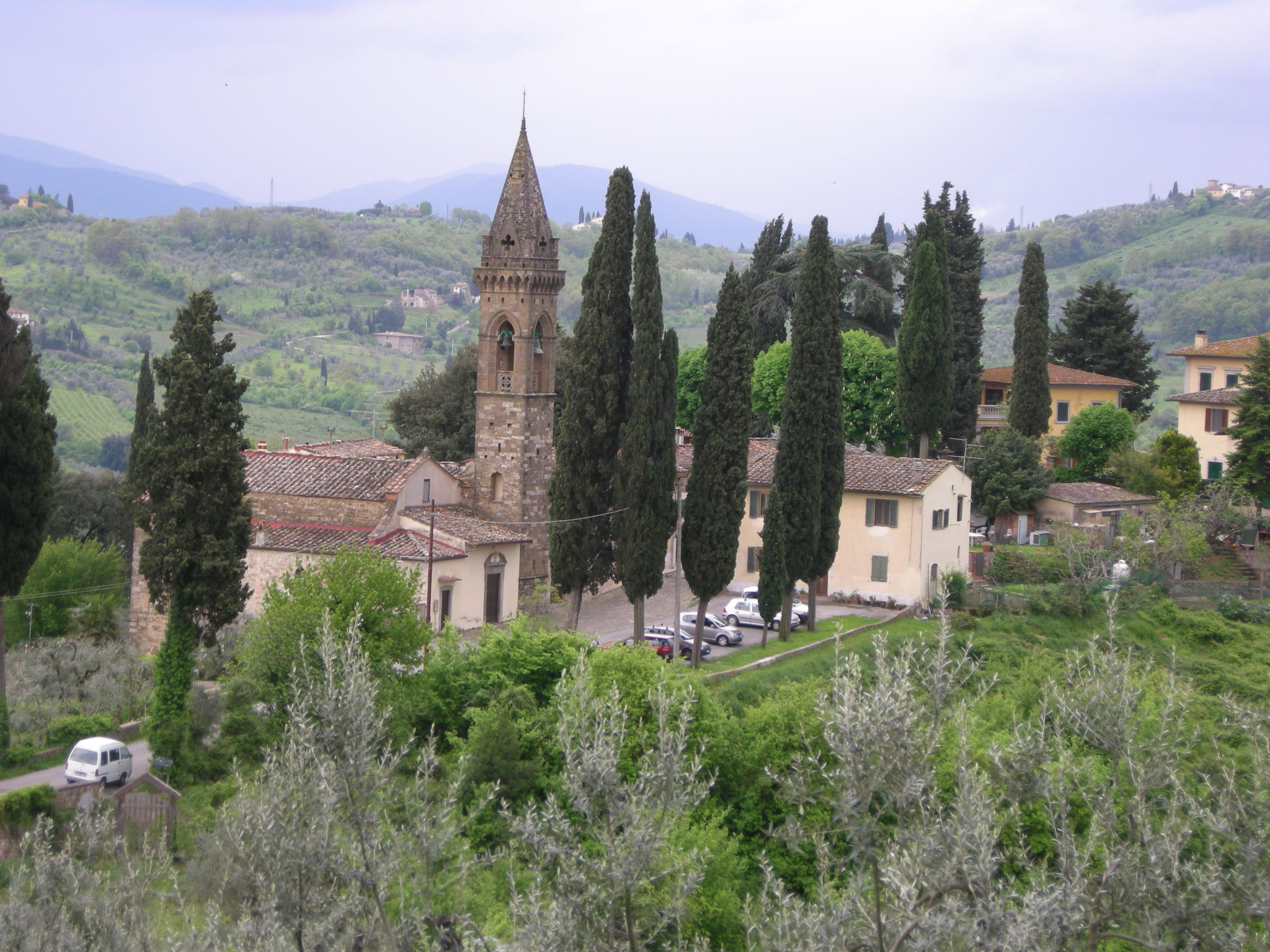 San Michele a Monteripaldi